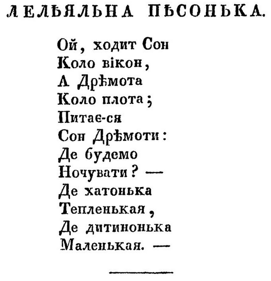 Українська народна пісня, колискова. Текст